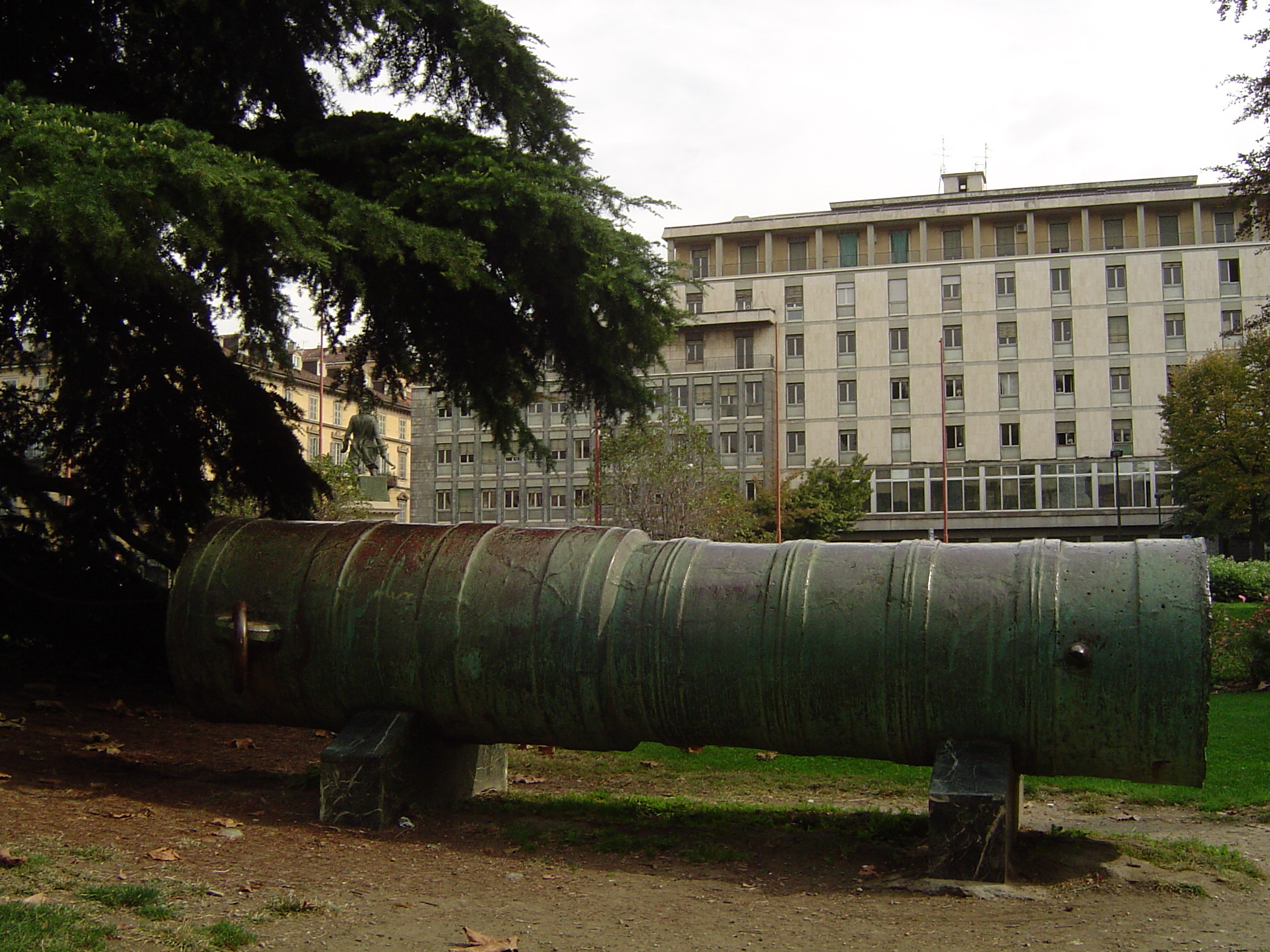 Museo Nazionale dell'Artiglieria di Torino Cannone Turco davanti all'ingresso del museo